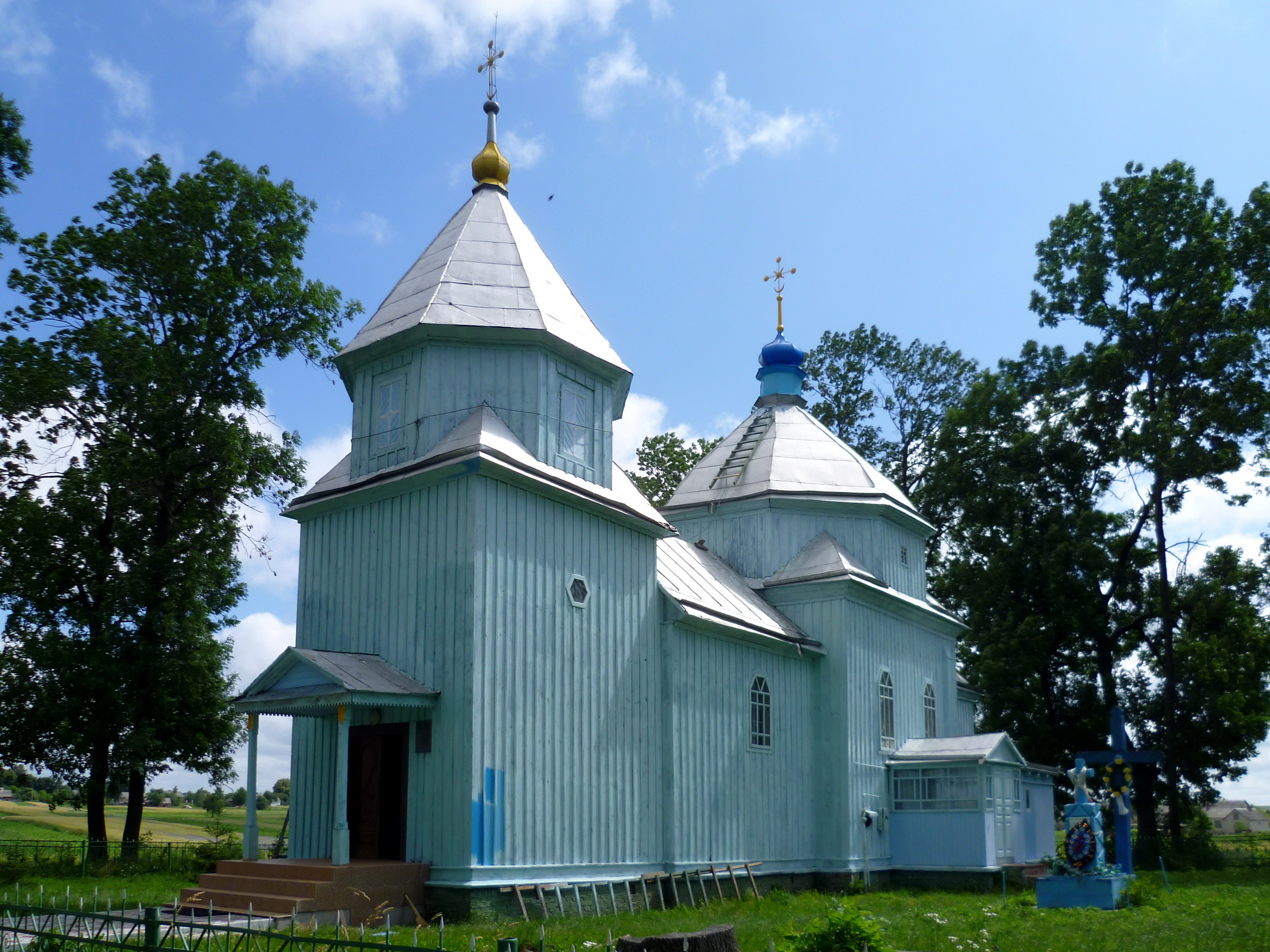 Покровська церква (поч. 18 ст.) - вигляд з південного заходу - с.Грибовиця Іваничівський район Волинська область Україна